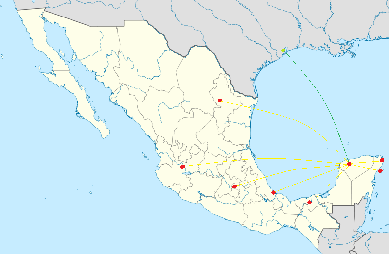 Rutas desde el Aeropuerto Internacional de Mérida, en Yucatán, Mx